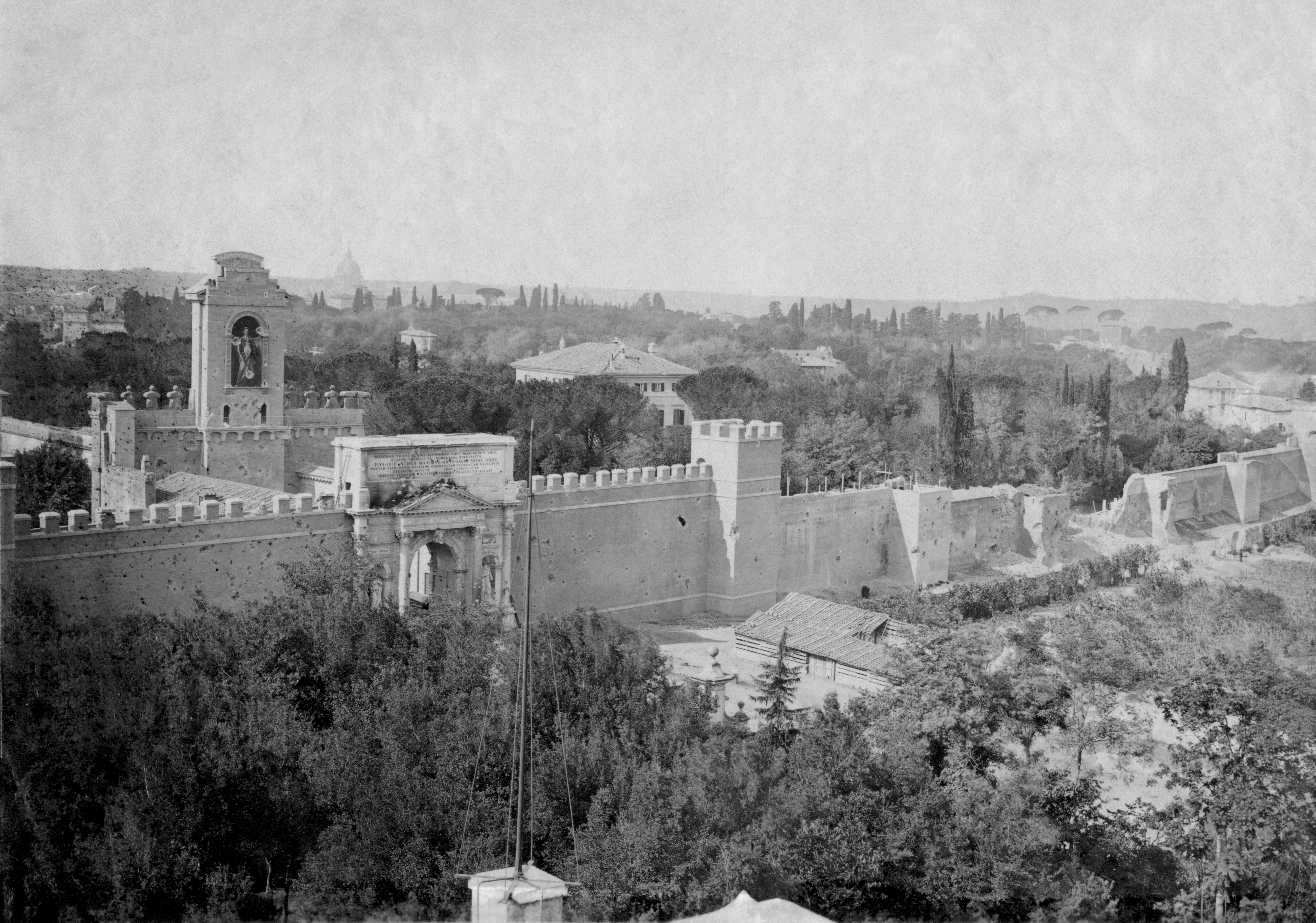 Roma, XX settembre 1870. Porta Pia e la Breccia aperta dall'artiglieria Italiana.